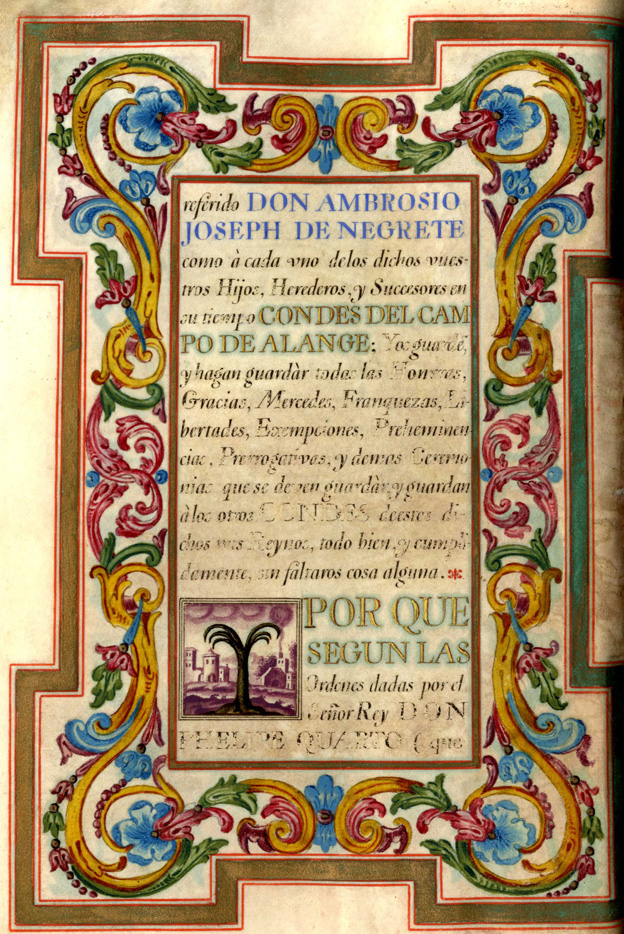 Fragmento de la carta de concesión del título de Conde del Campo de Alange a D. Ambrosio José de Negrete y Ampuero